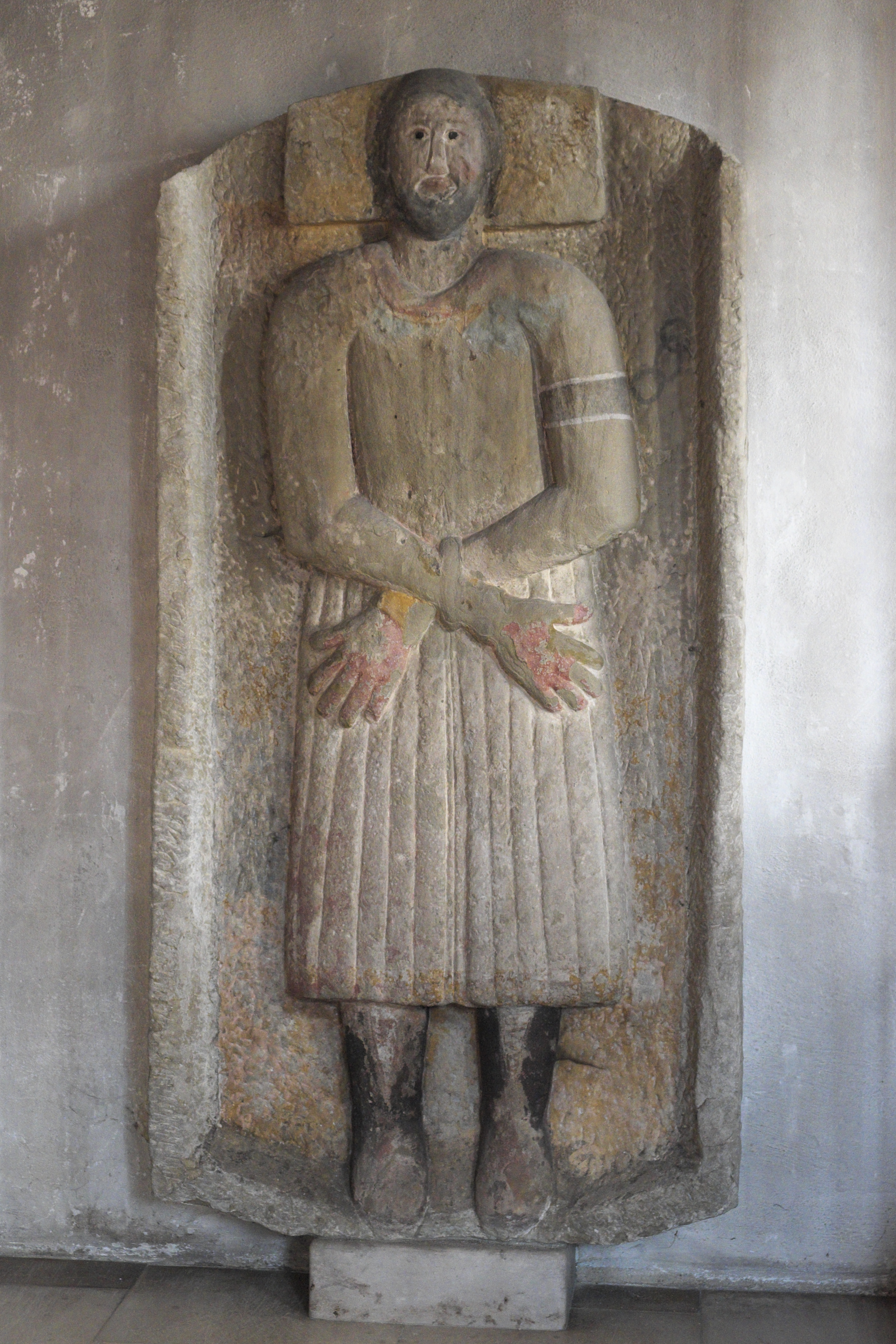 Katholische Filialkirche St. Laurentius, ehemals Wallfahrtskirche St. Nantwein (Antovinus) in Nantwein, einem Stadtteil von Wolfratshausen im Landkreis Bad Tölz-Wolfratshausen (Bayern/Deutschland), spätromanisches Sandsteinrelief des hl. Nantovinus